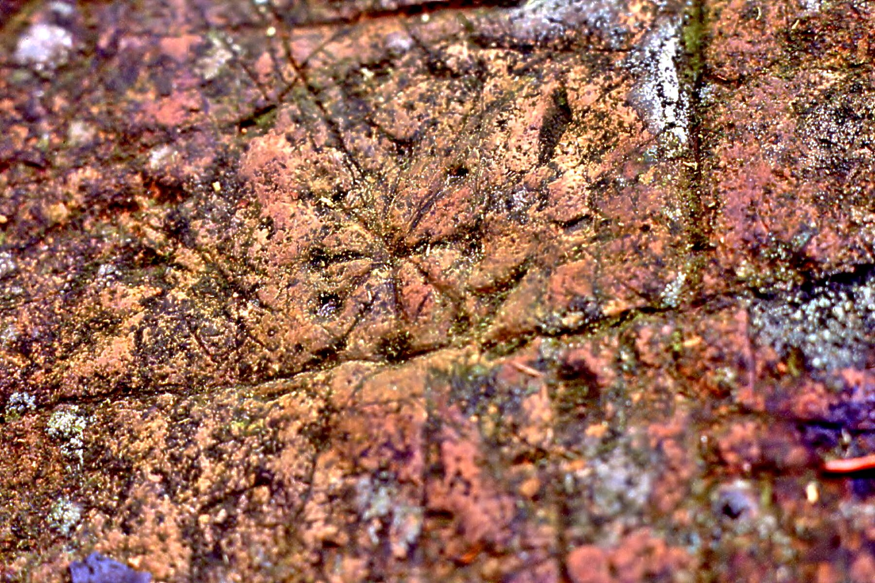 pétroglyphe sur la pierre écrite. Massif du Ballon d'Alsace. Territoire de Belfort